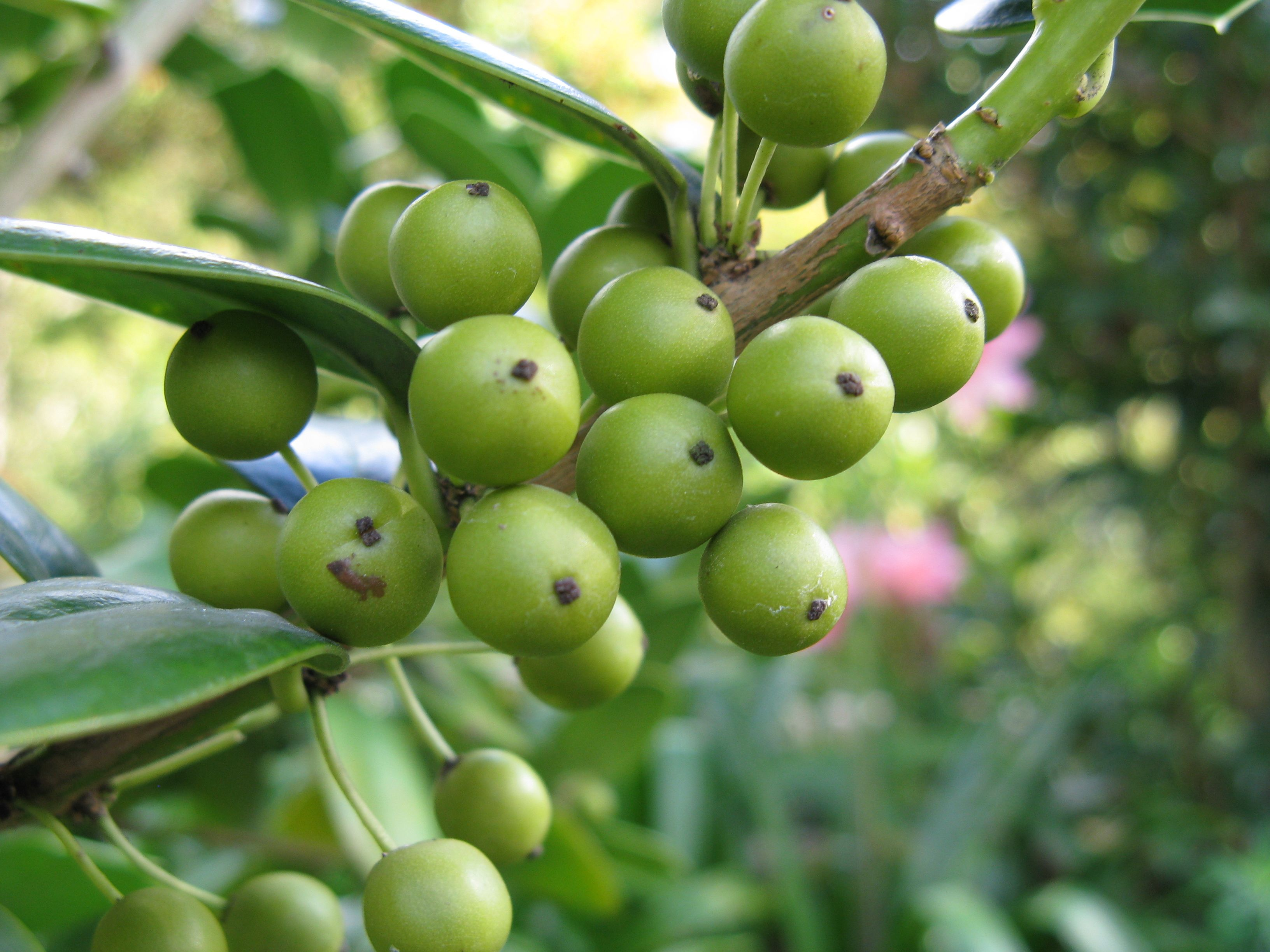 Ilex cornuta